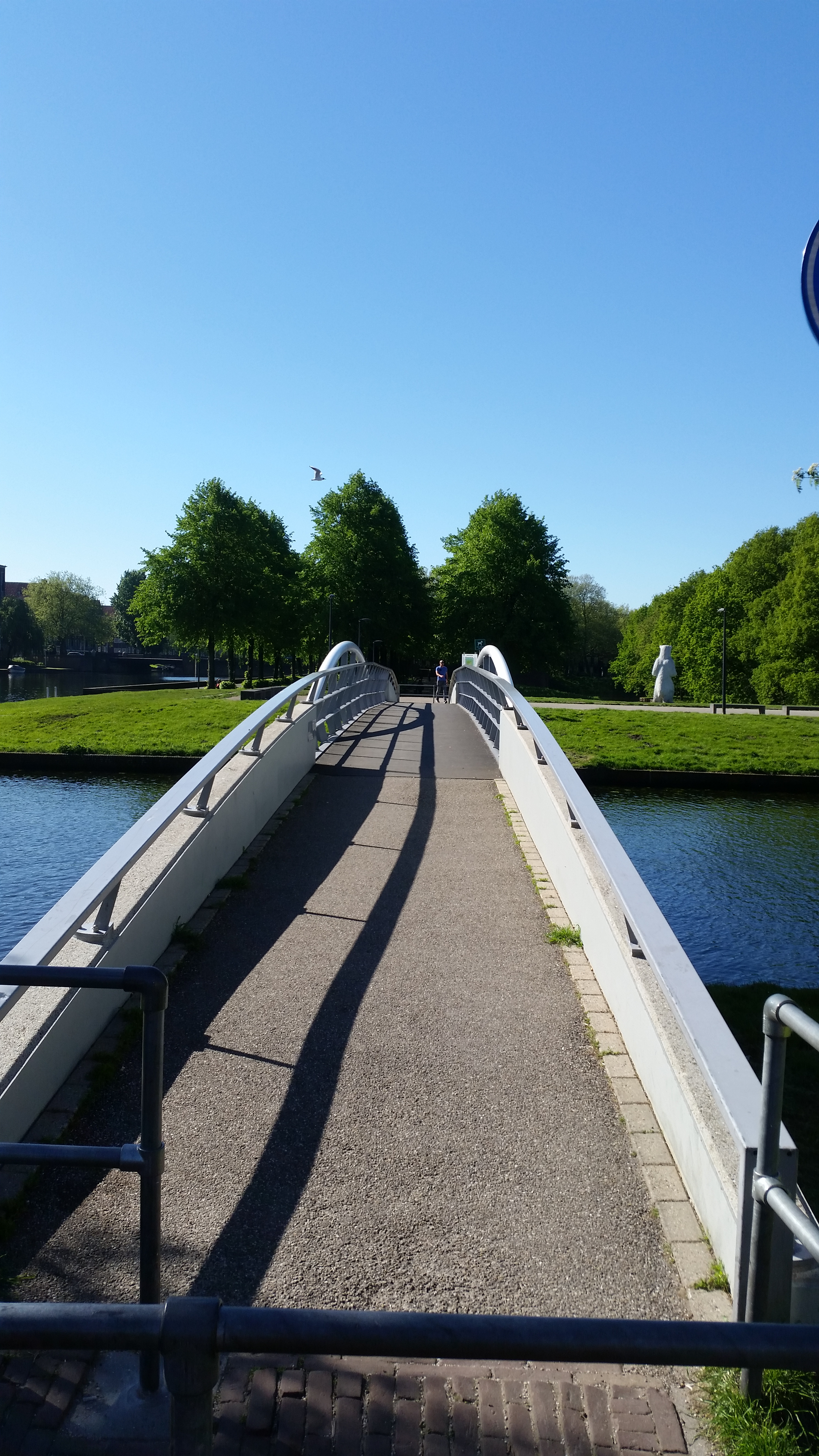 Brug 393, Wil de Graaffbrug, Amsterdam, in de lengte